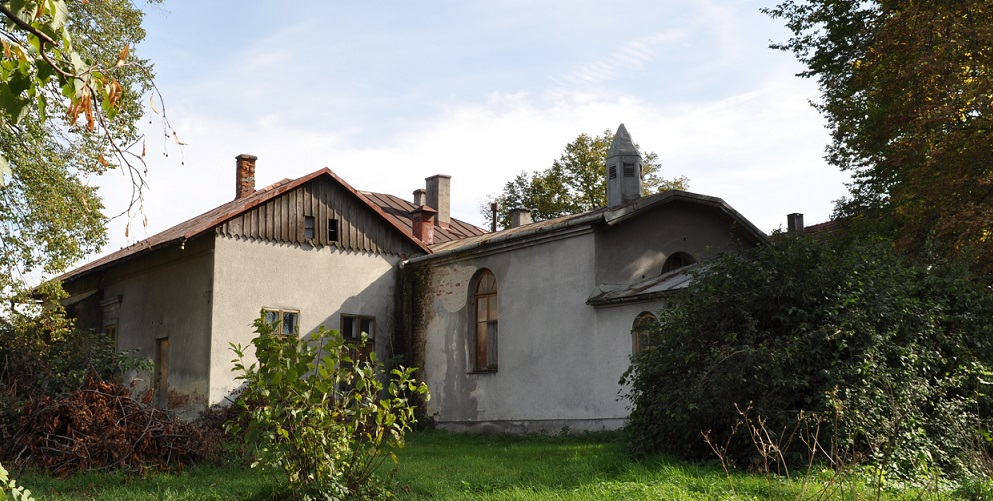 Dwór z początku XXw. z kaplicą w Koszycach Małych. Wzniesiony dla Hirscha Maschlera w miejscu starszego dworku obronnego.